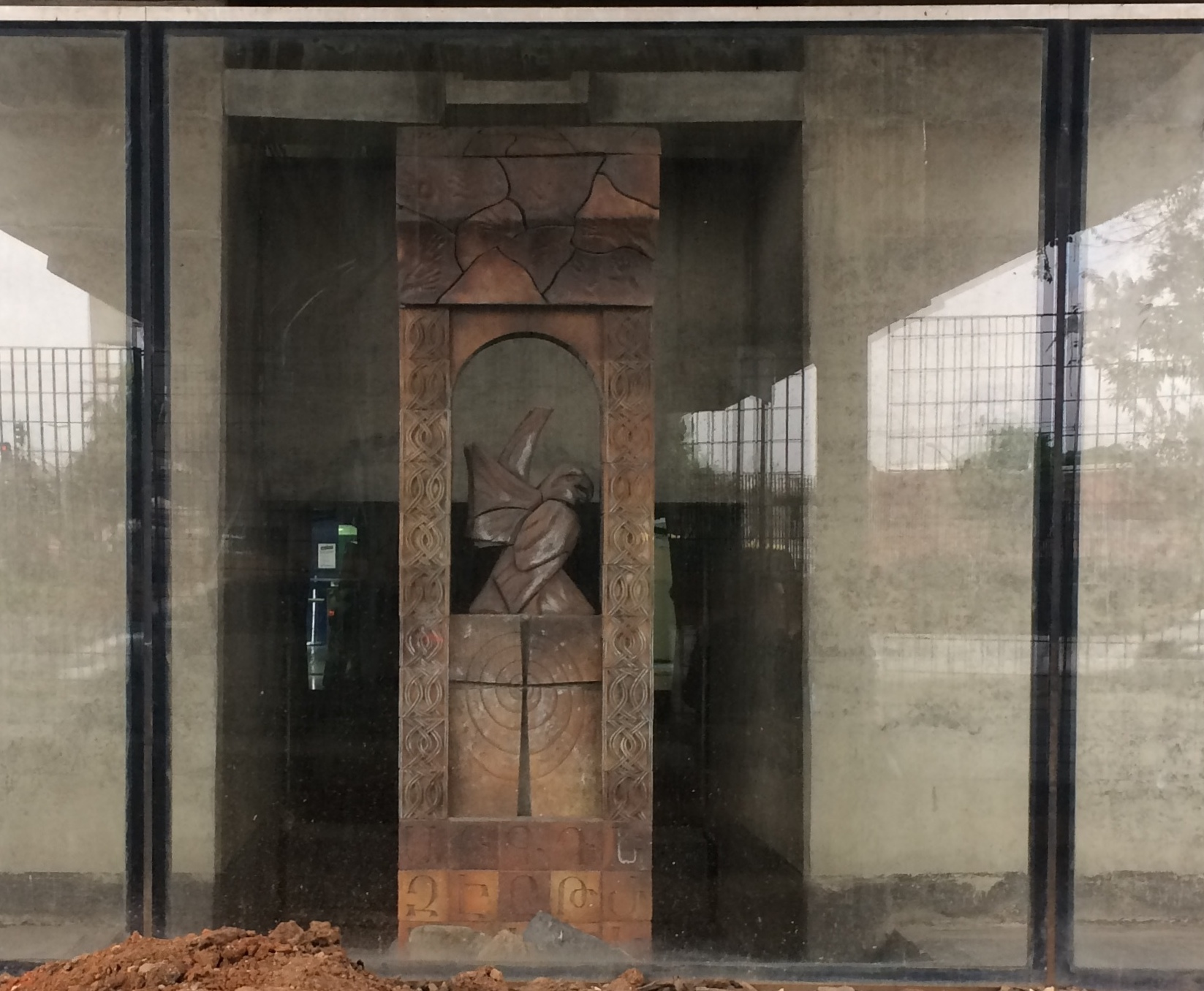 Foto da fachada do Memorial Armênia, que faz parte do Acervo da Companhia do Metropolitano de São Paulo, com a visão de fora da Estação Estação Armênia do Metrô de São Paulo (SP). Criado pela artista Josely Carvalho, o monumento é feito de cerâmica, vidro jateado, luz, água e paisagismo, e mede 3,66m X 1,10m.